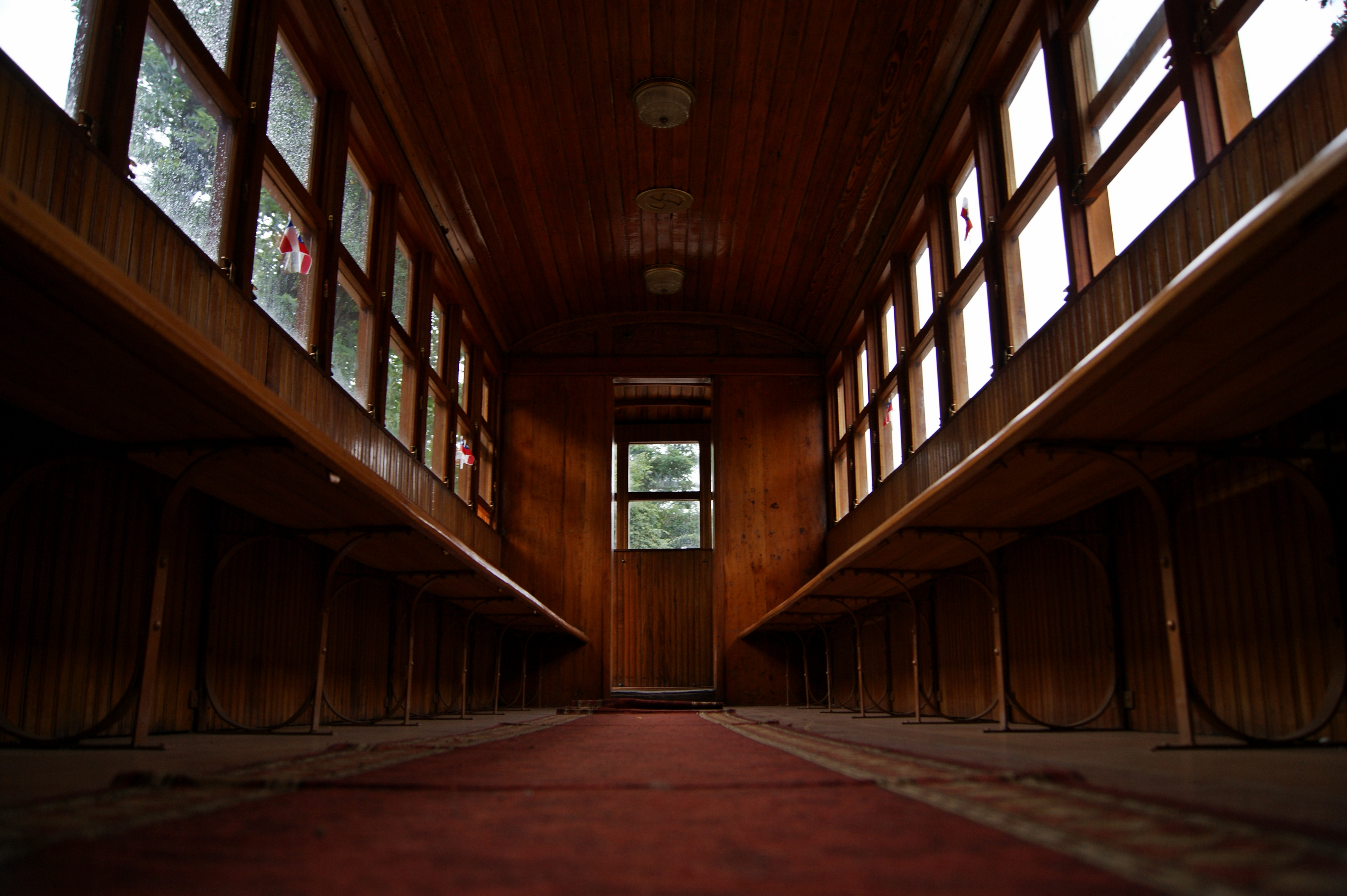 Construcciones existentes a lo largo del trazado del Ferrocarril de Puente Alto a El Volcán. This is a photo of a national monument in Chile: 881